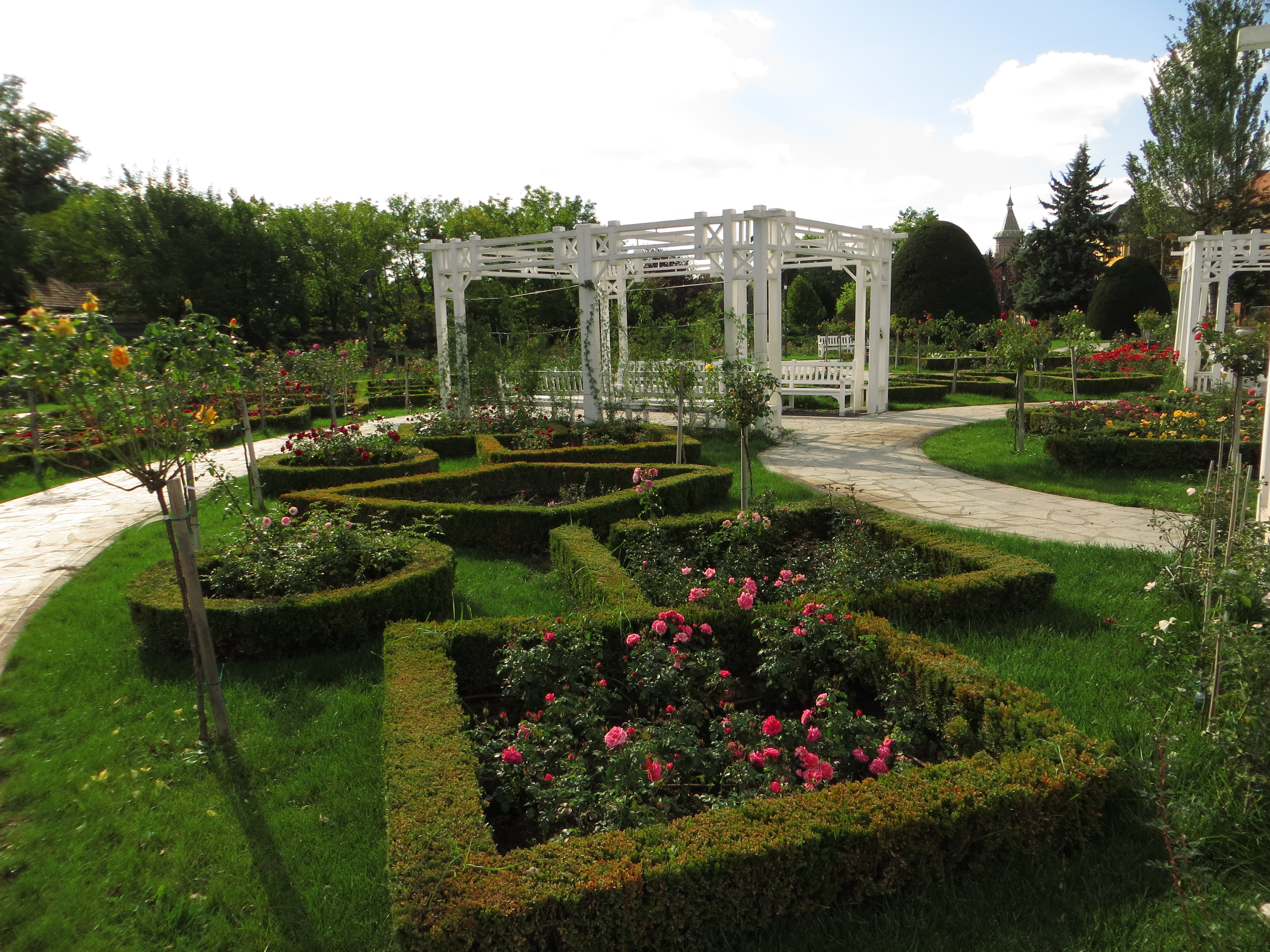 Parcul Rozelor